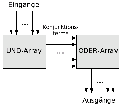 Programmable Logic Array